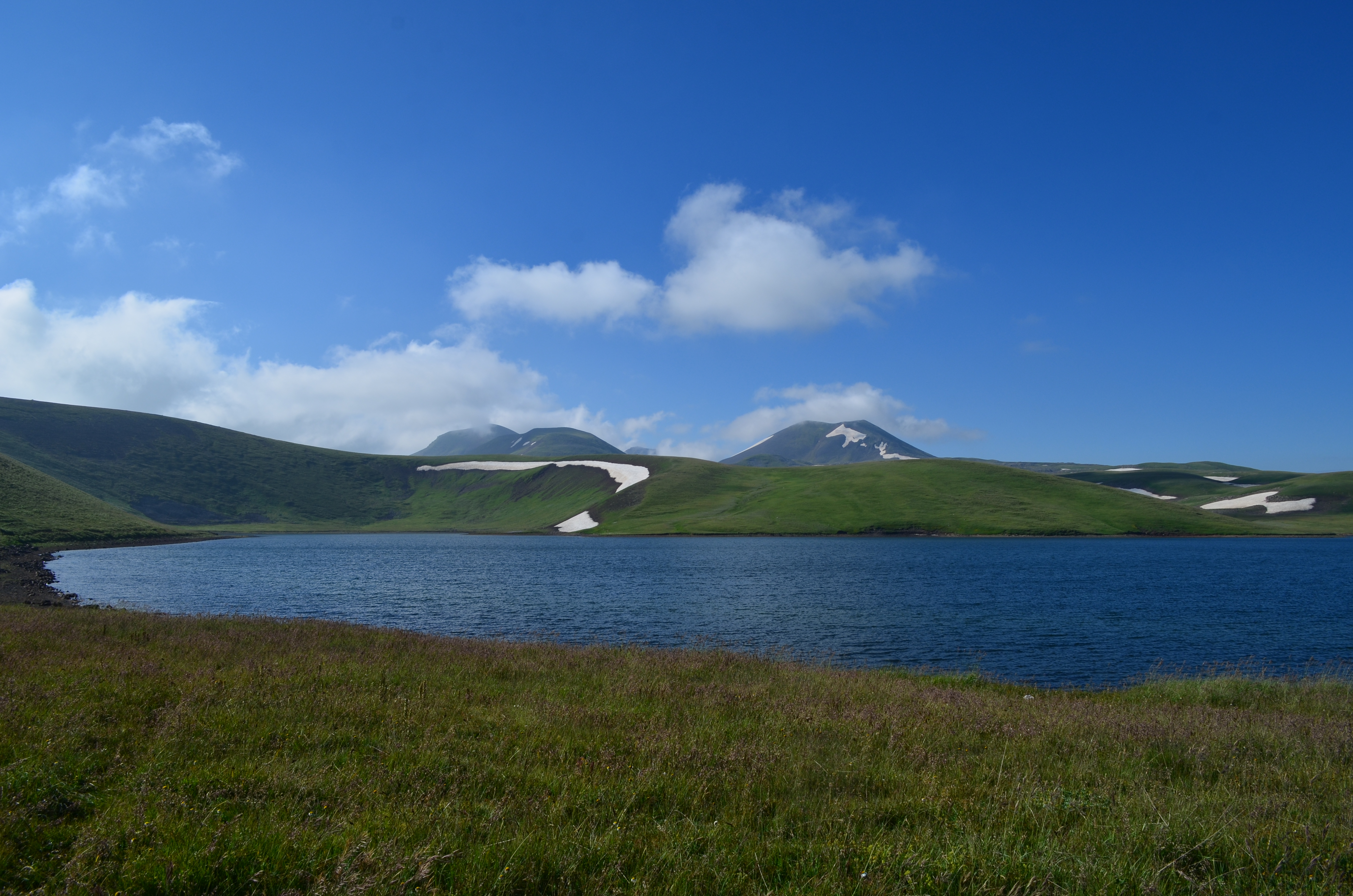 «Ակնա» լիճ4